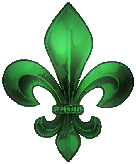 Flor-de-lis.